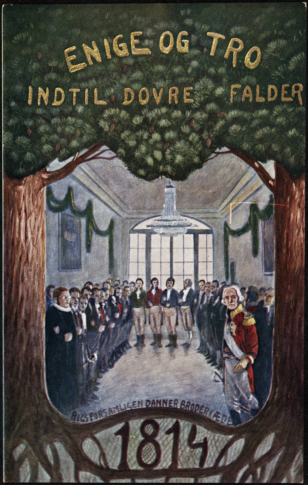 Tittel / Title: Enige og Tro indtil Dovre falder : Rigsforsamligen danner Broderkæde Beskrivelse / Description: Postkort. Dato / Date: 1914 Kunstner / Artist: ukjent / unknown Utgiver / Publisher: ukjent / unknown Eier / Owner Institution: Nasjonalbiblioteket / National Library of Norway Lenke / Link: Bildesignatur / Image Number: blds_05715